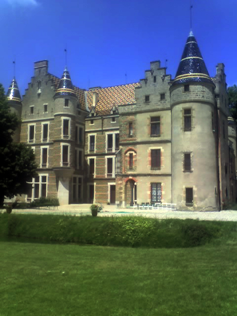 Château de Pupetières (Classé) .